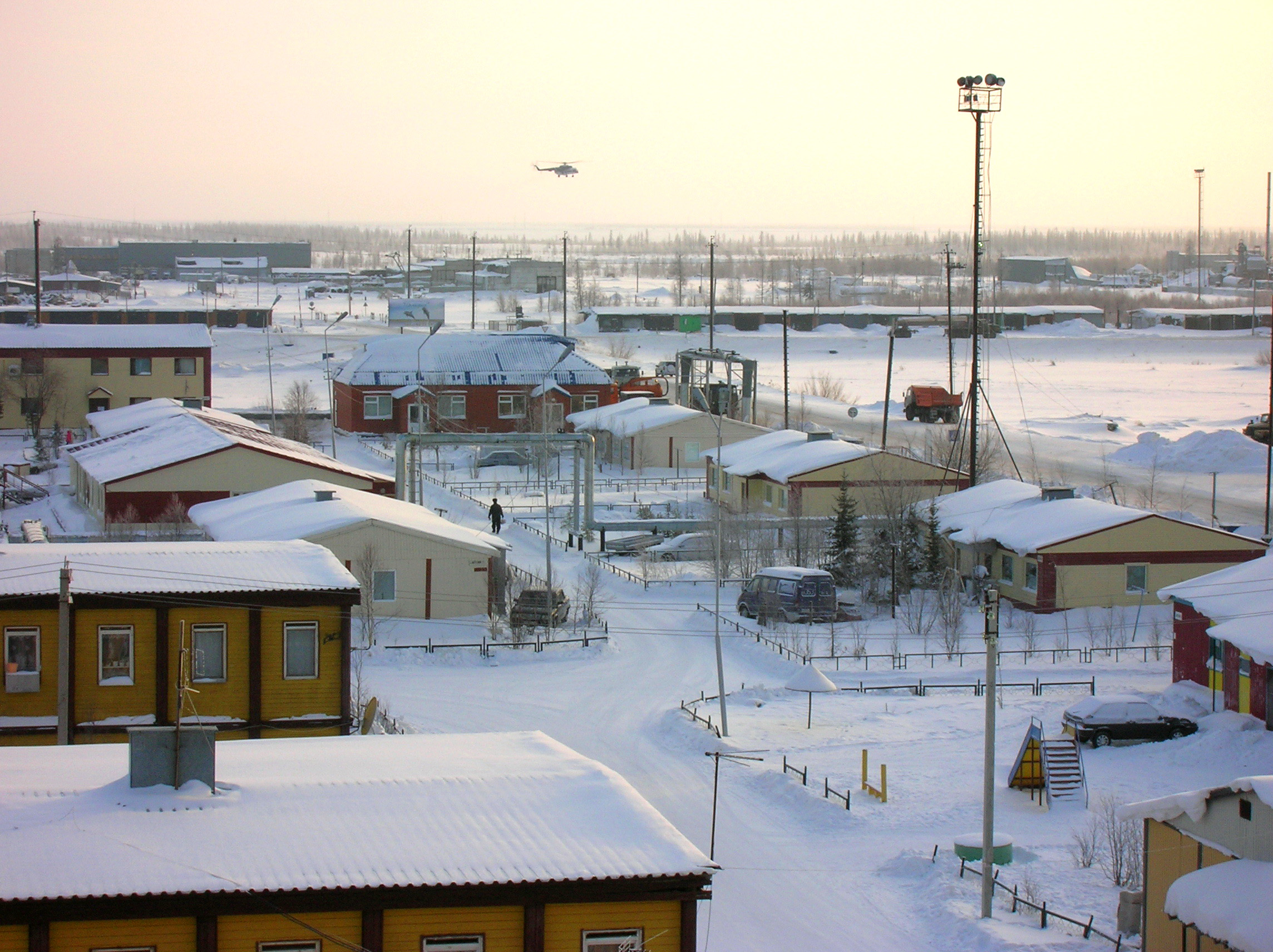 Пангоды с высоты многоэтажки